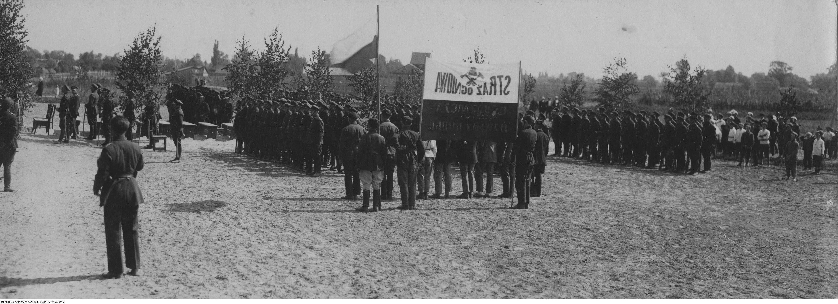 Święto żołnierza polskiego w 17 Batalionie Korpusu Ochrony Pogranicza "Dawidgródek"; 1931 r. Msza polowa. Koncern Ilustrowany Kurier Codzienny - Archiwum Ilustracji.